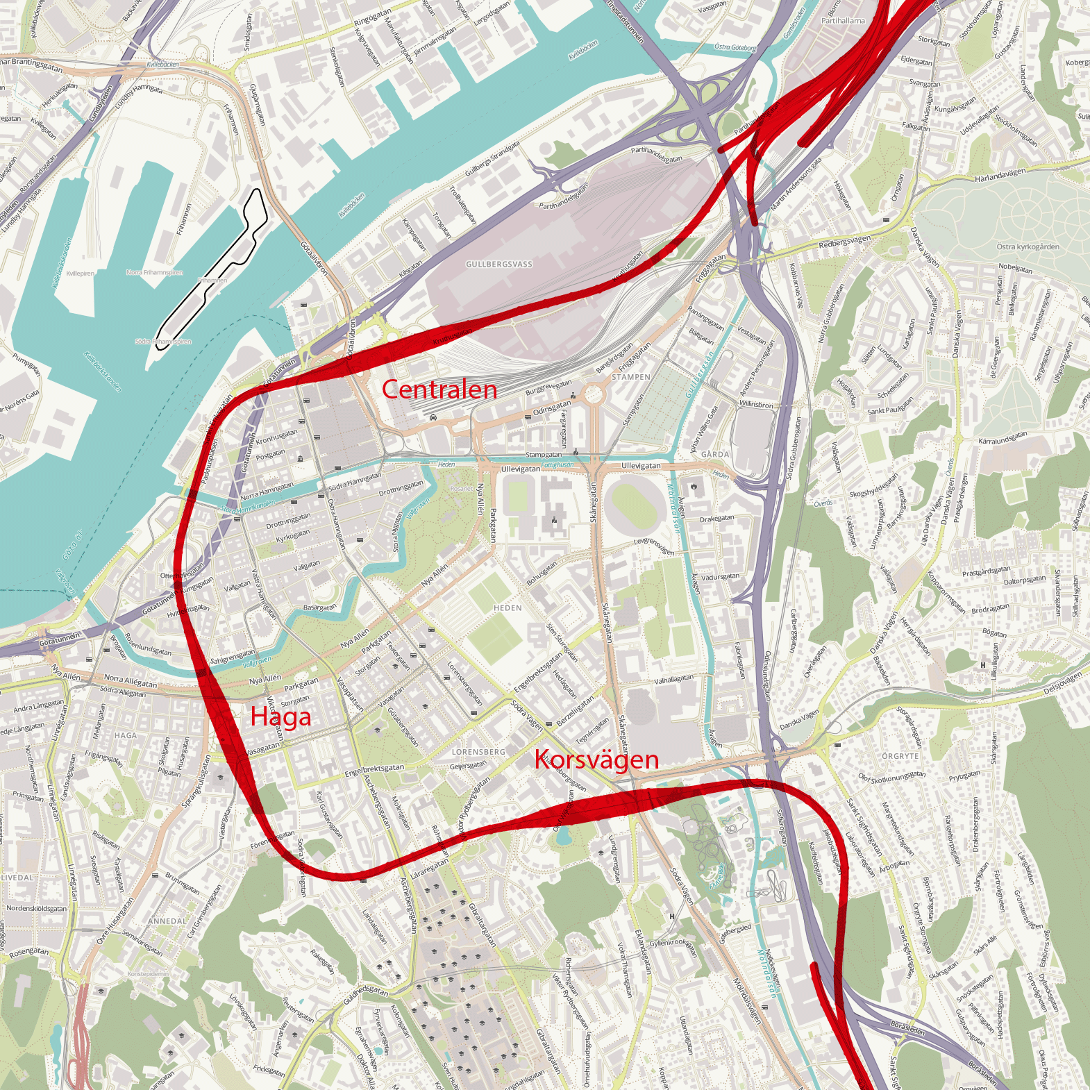 OpenStreetMaps-karta över Göteborg med ett lager som visar järnvägstunneln Västlänkens dragning